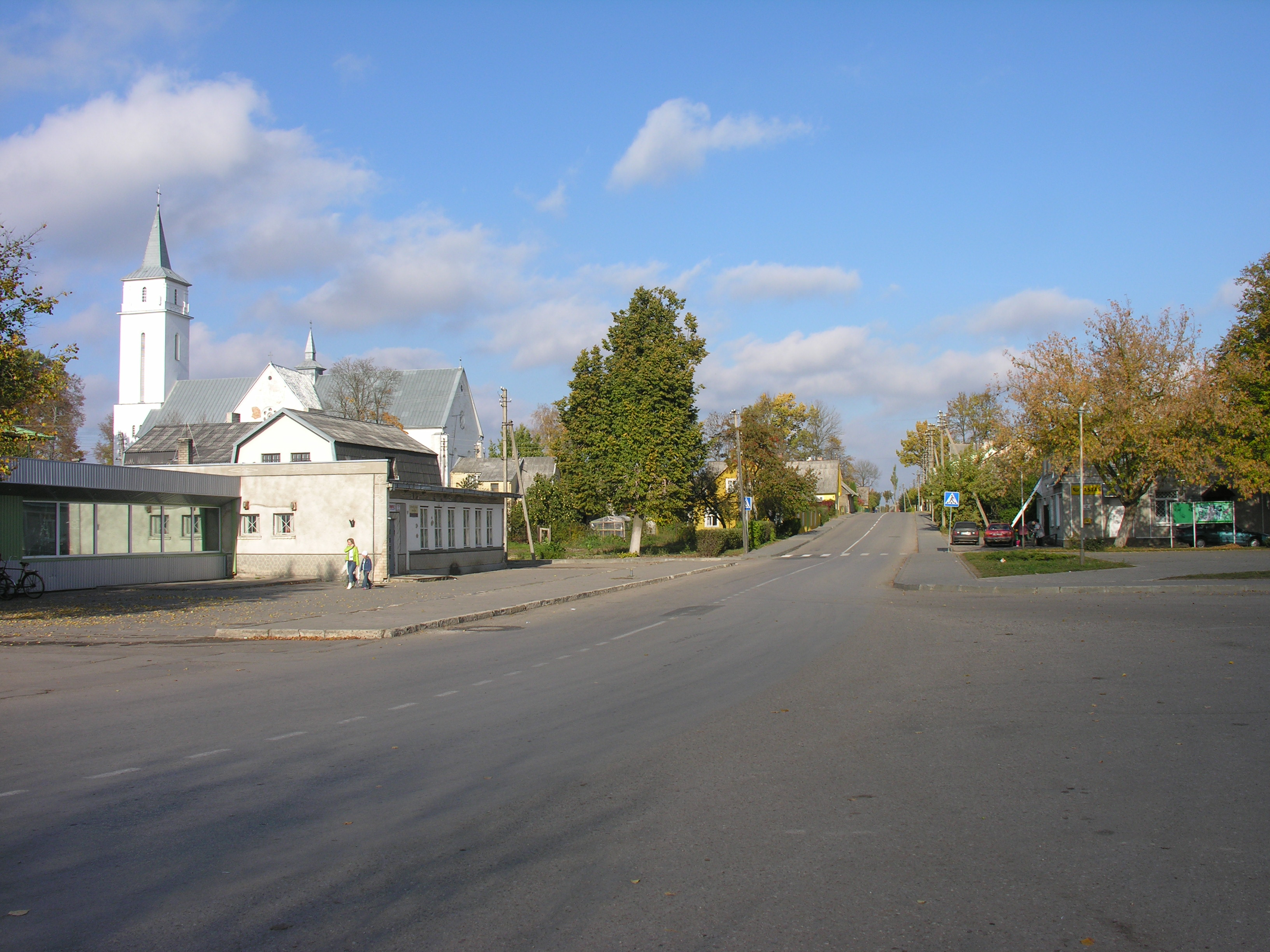 Viekšniai, Mažeikių raj. Foto: Algirdas, 2005 m. spalio 20 d.